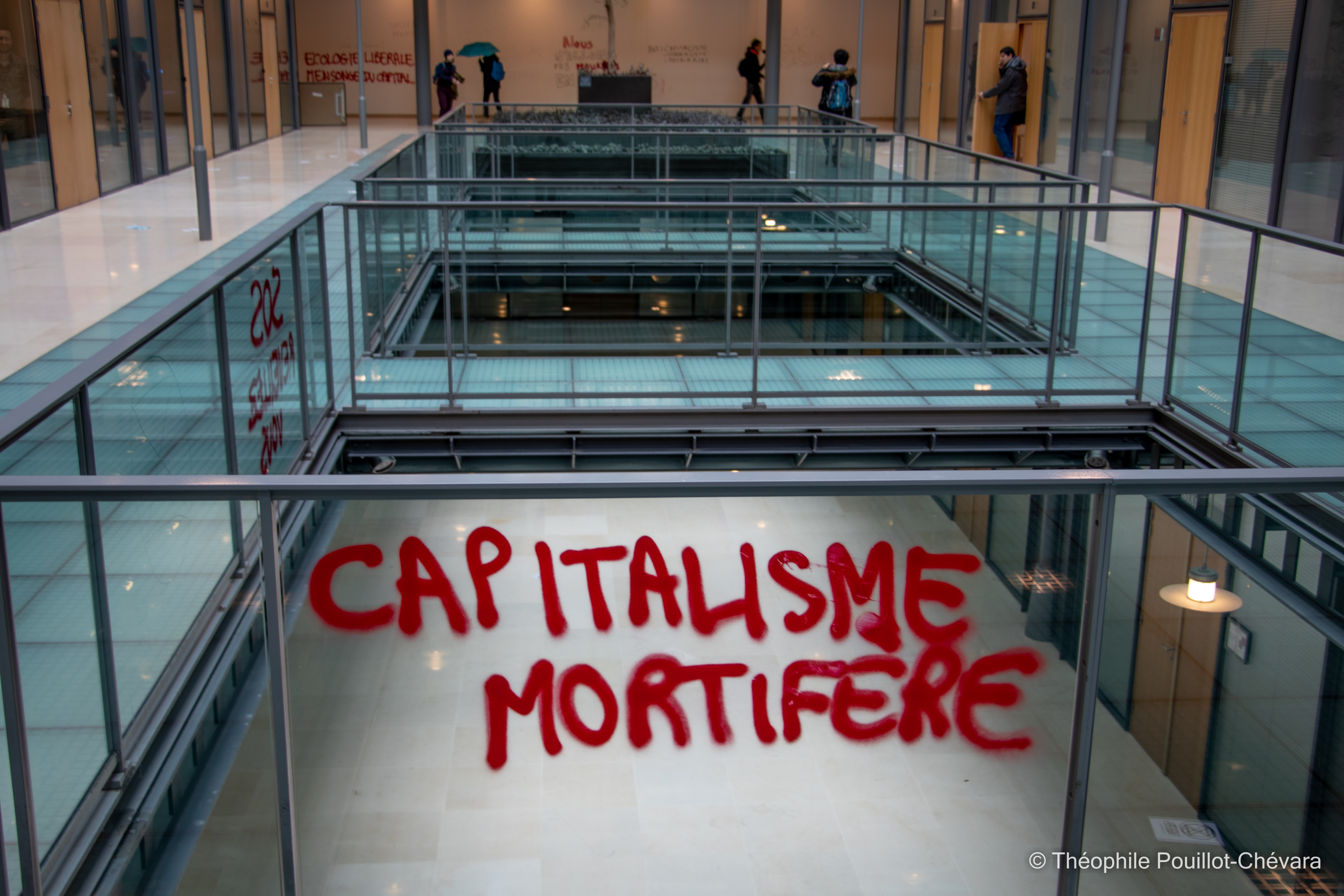 Tag "Capitalisme mortifère" dans les locaux de Black Rock France.